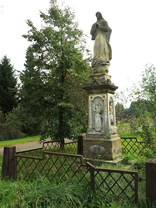 Socha Panny Marie, naproti čp. 19 a čp. 2, Skyšice.